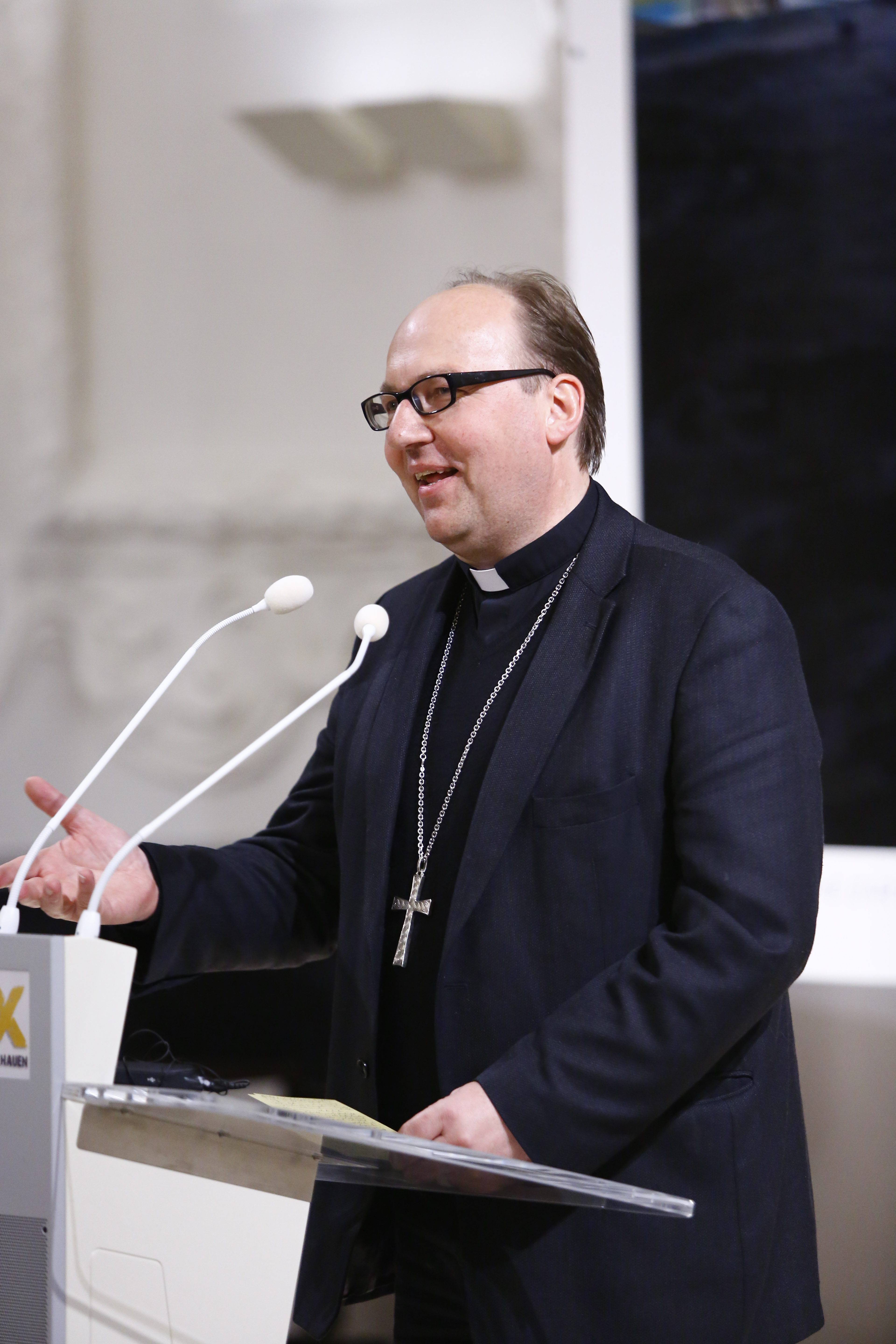 Hermann Glettler (Bischof Diözese Innsbruck / bishop Innsbruck Diocese) @ Priesterseminar Diözese Graz-Seckau Laufzeit / Duration: 12.04.-26.08.2018 Kuratiert von / Curated by: Katrin Bucher Trantow, Johannes Rauchenberger und Barbara Steiner Foto / Photo: Universalmuseum Joanneum/C. Nestroy